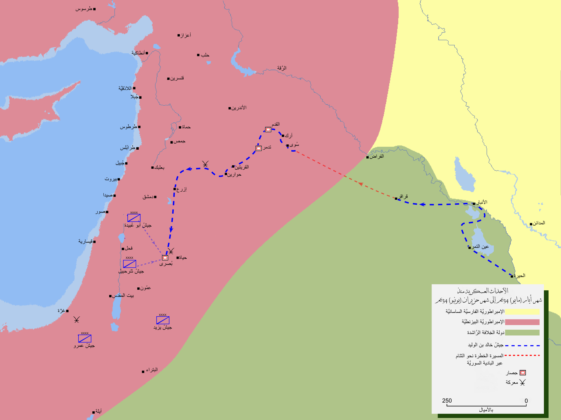 خارطة تُظهرُ مسير خالد بن الوليد من العراق إلى الشَّام.